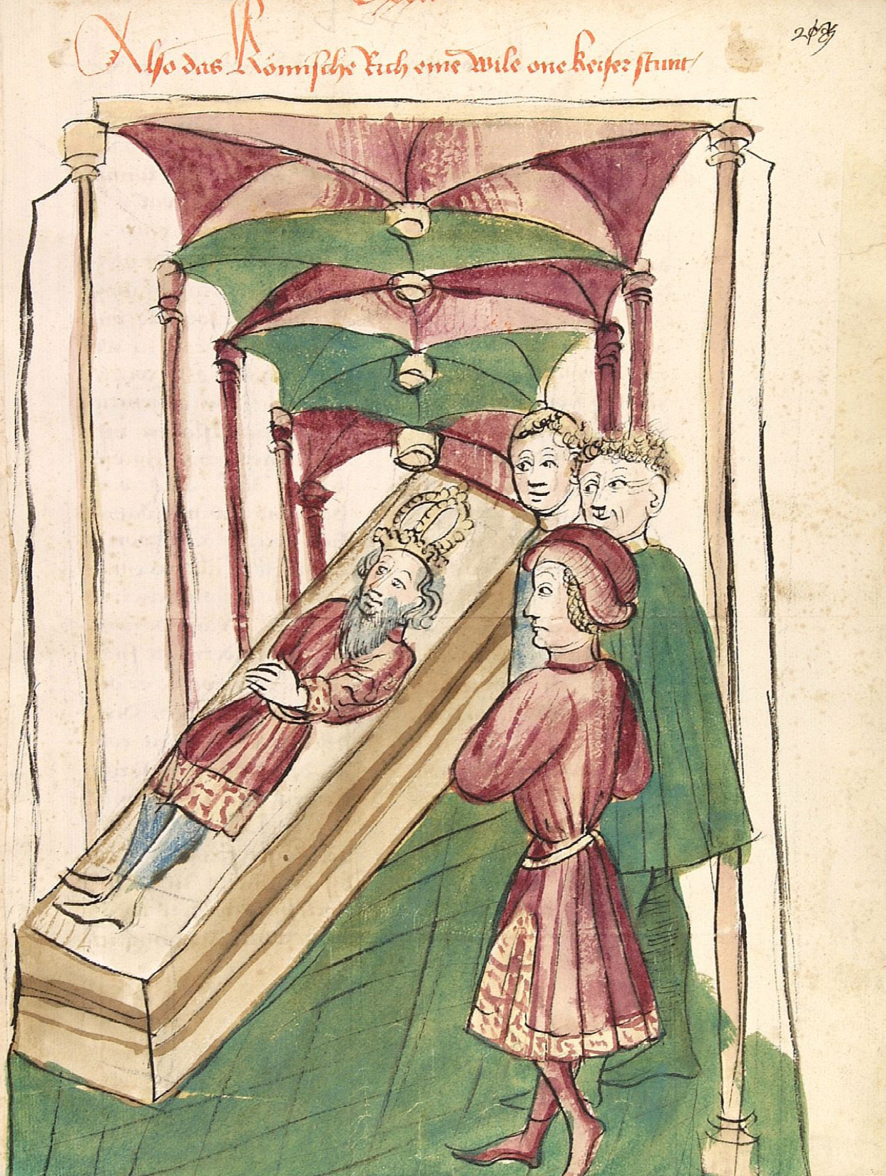 Das Interregnum: Drei Männer am Grab eines Kaisers Werkstatt des Diebold Lauber Künstler unbekannt Drei Männer stehen zum Teil mit betroffenem Gesichtsausdruck am Grabmal eines Kaisers, das von einem von mehreren Diensten getragenen mehrteiligen Gratgewölbe überdeckt wird und die vollplastische Figur des Verstorbenen zeigt.